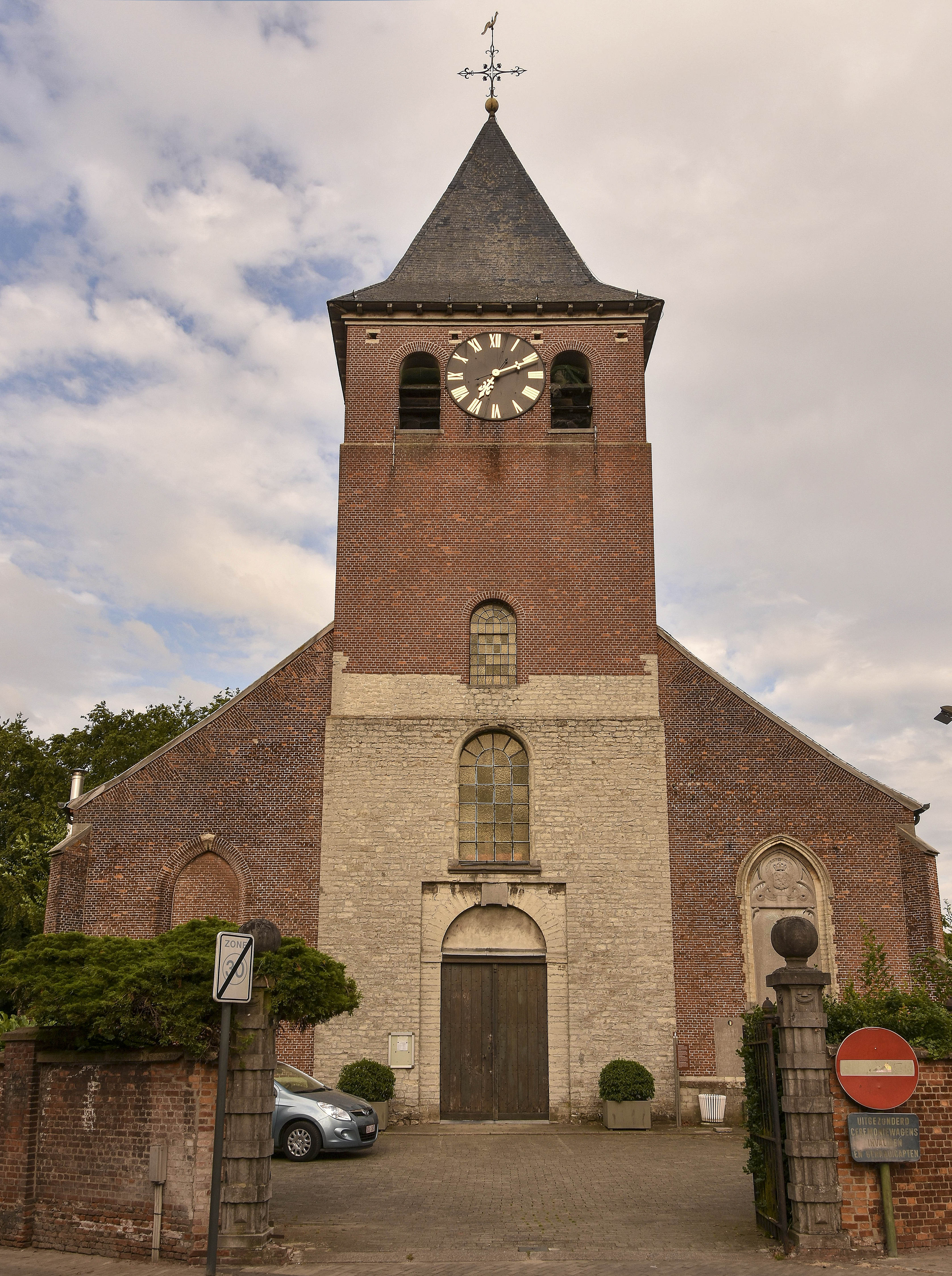 Sint-Niklaaskerk (Leest) 16-06-2018 19-10-03